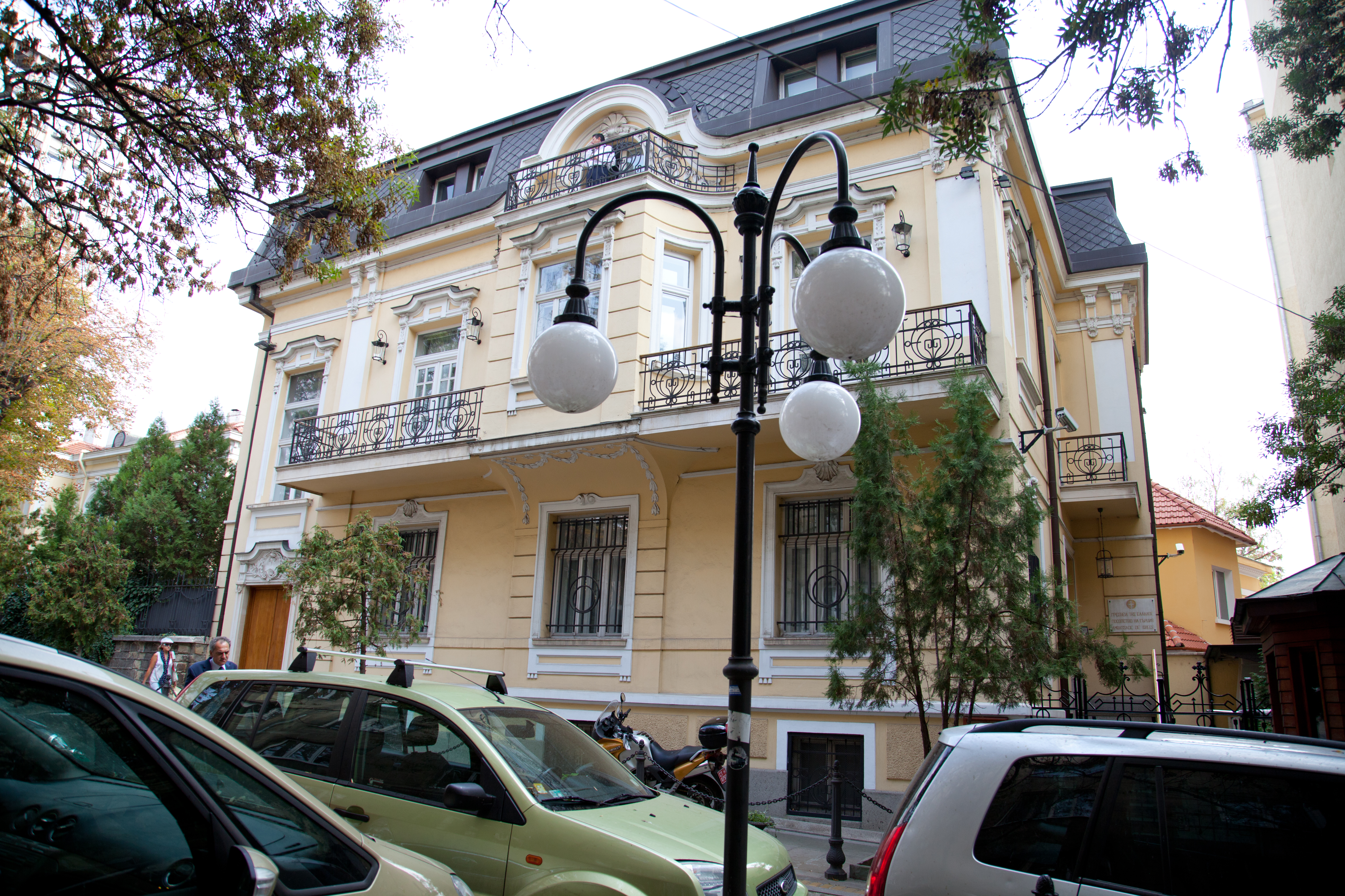 Sofia;griechische Botschaft